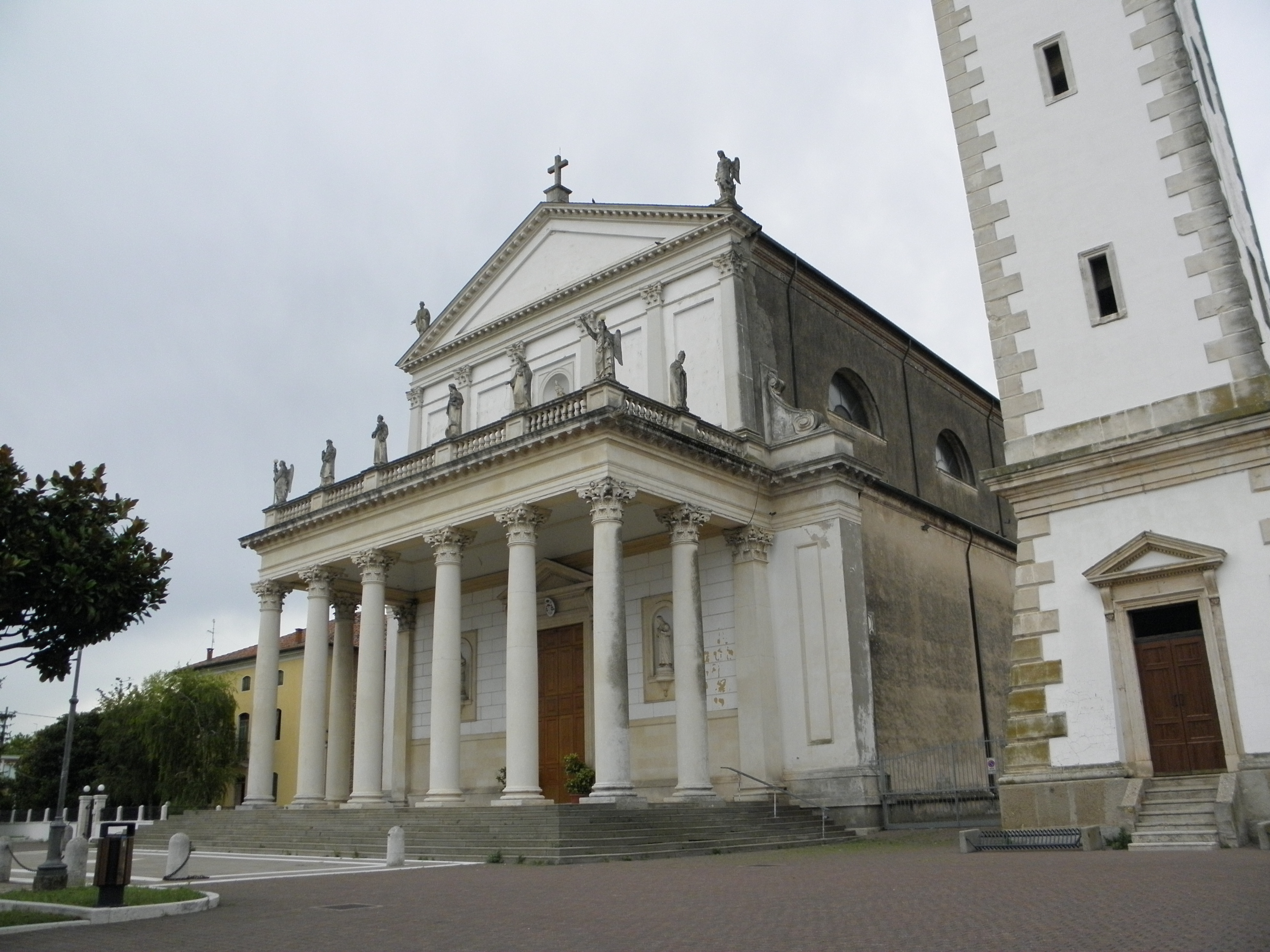 Sossano, la chiesa parrocchiale di San Michele Arcangelo.